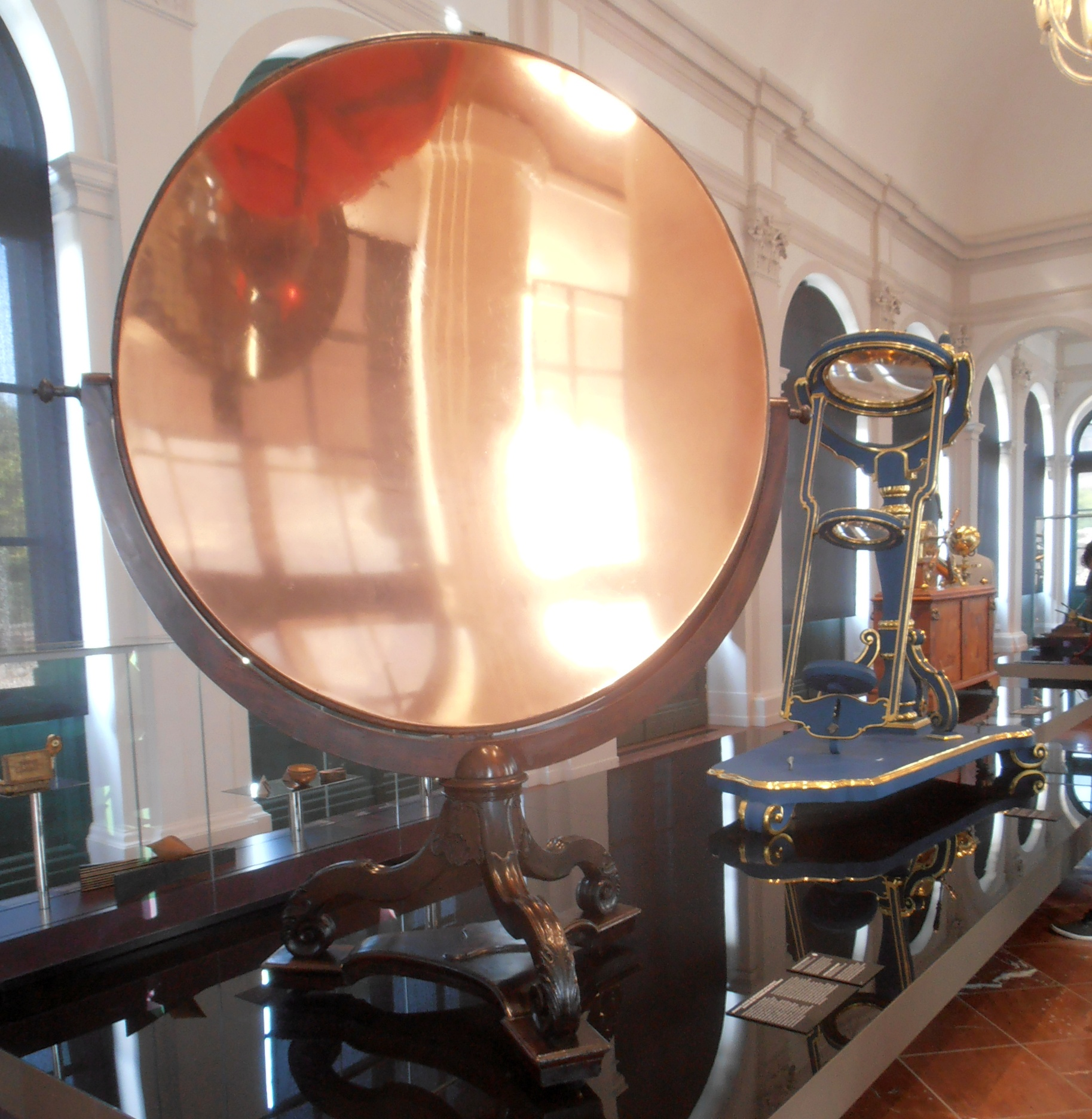 Sphärischer Brennspiegel von Ehrenfried Walther von Tschirnhaus von 1686 im Festsaal des Mathematisch-Physikalischen Salons im Zwinger Dresden